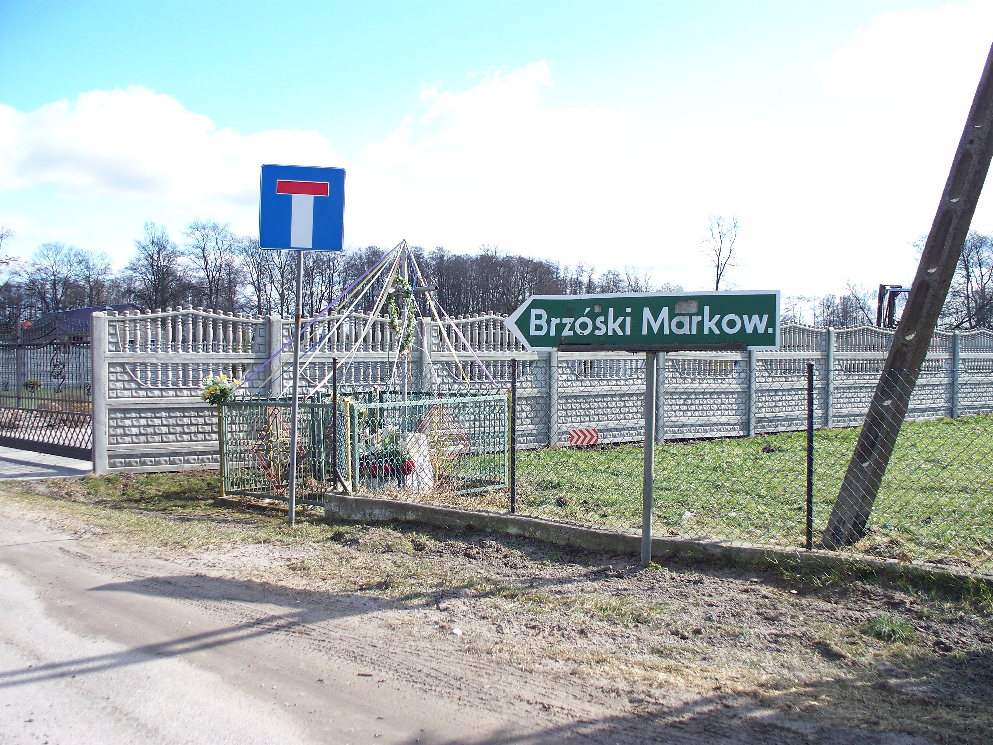 Drogowskaz ten znajduje się w miejscowości Brzóski Brzezińskie na zakręcie.